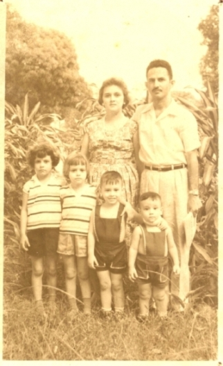 Raimundo e Isa Jinkings com os 4 filhos mais velhos, na Praça Batista campos